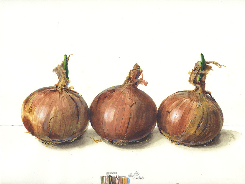 Robert C. Rore WV3774 "Zwiebeltrio", Aquarell auf Papier, 30x40cm, 2002